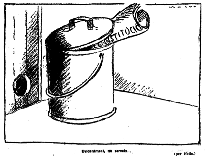 392 24,8,1935 humanitat